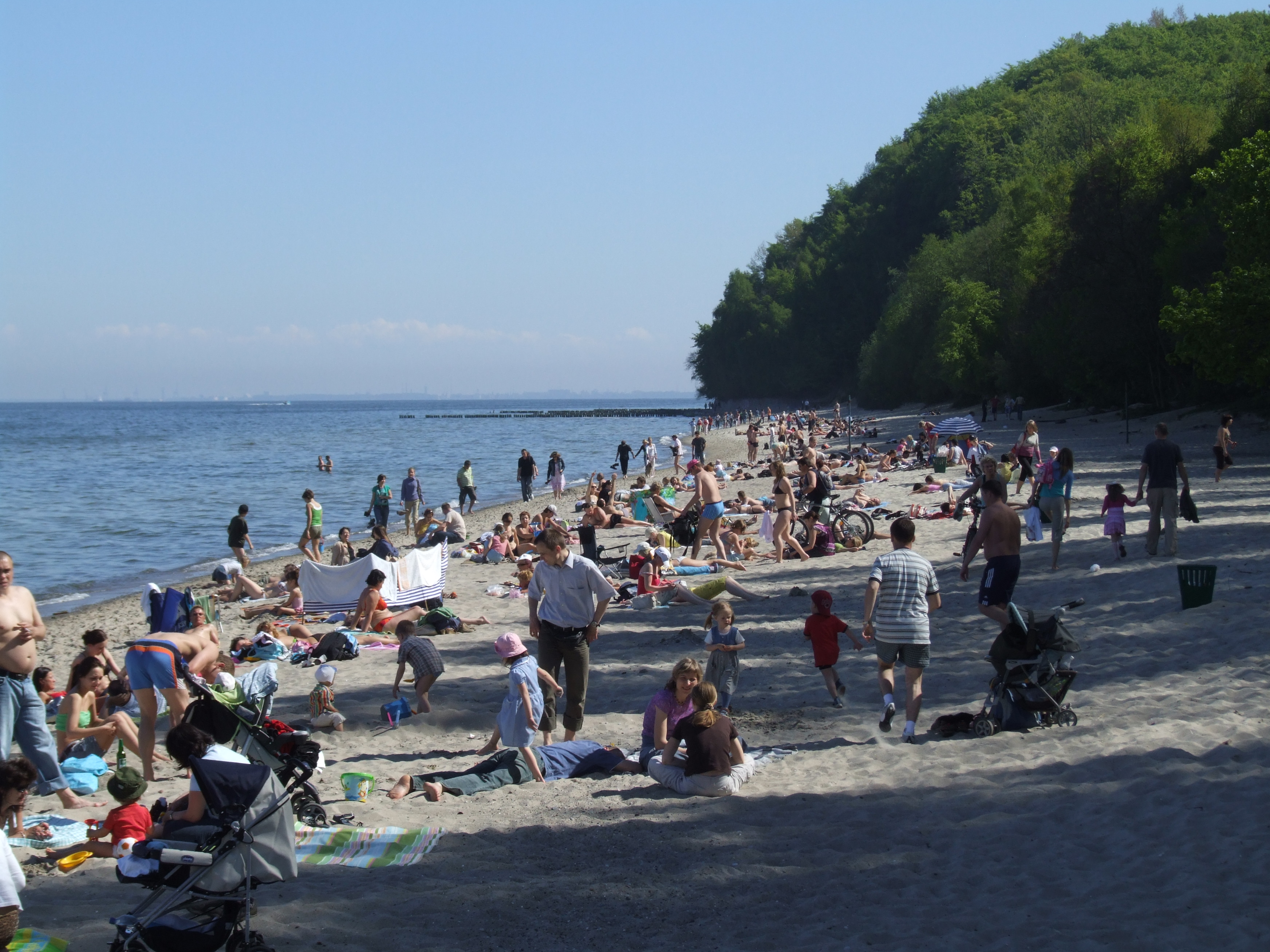 Plaża w Gdyni-Redłowie